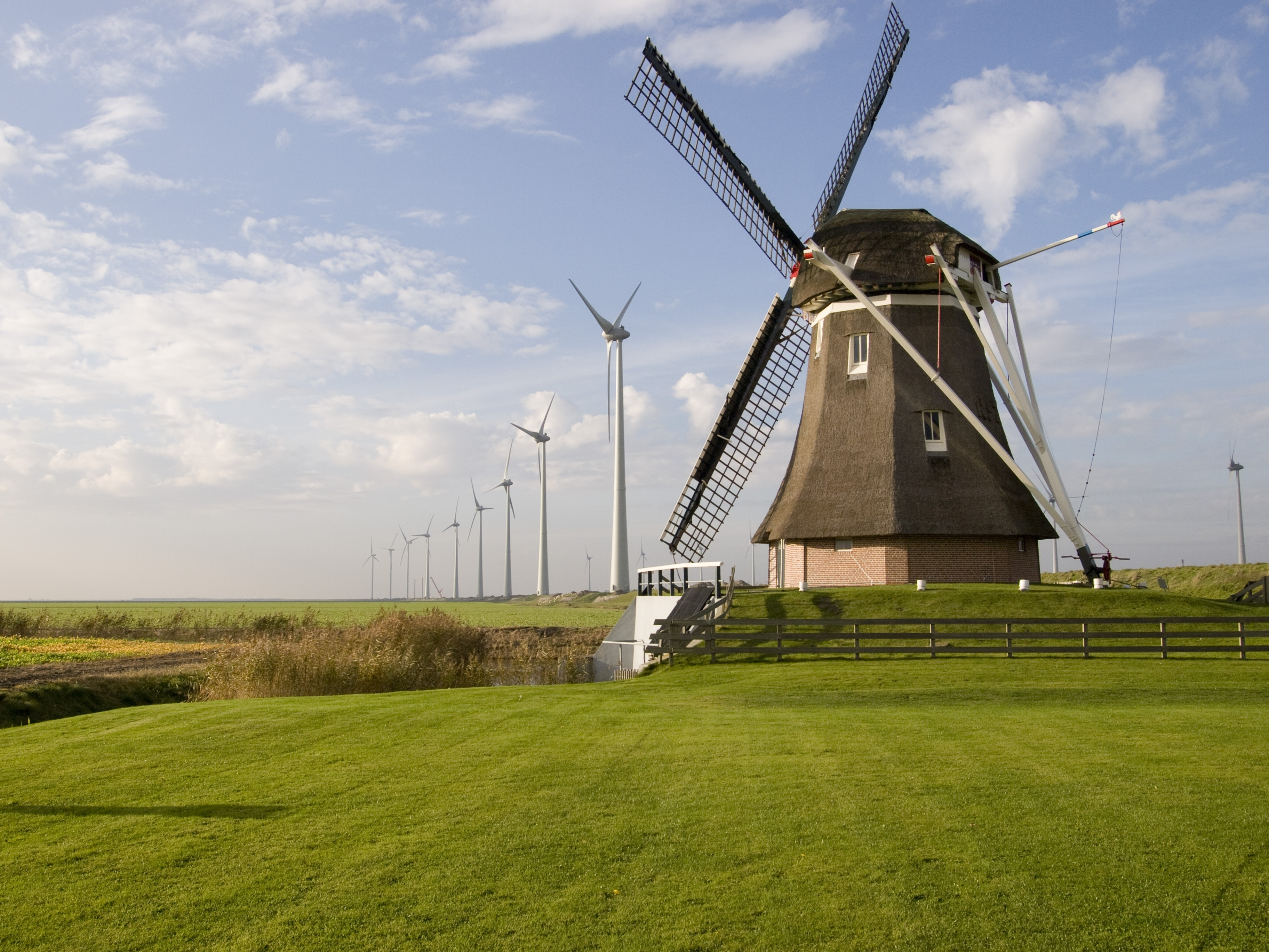 Het grootste windpark op Nederlandse bodem is windpark Westereems in Eemshaven. Tussen de megagrote windturbines van Essent staat ook nog de oude molen Goliath. Foto: Essent; JBF Multi Media